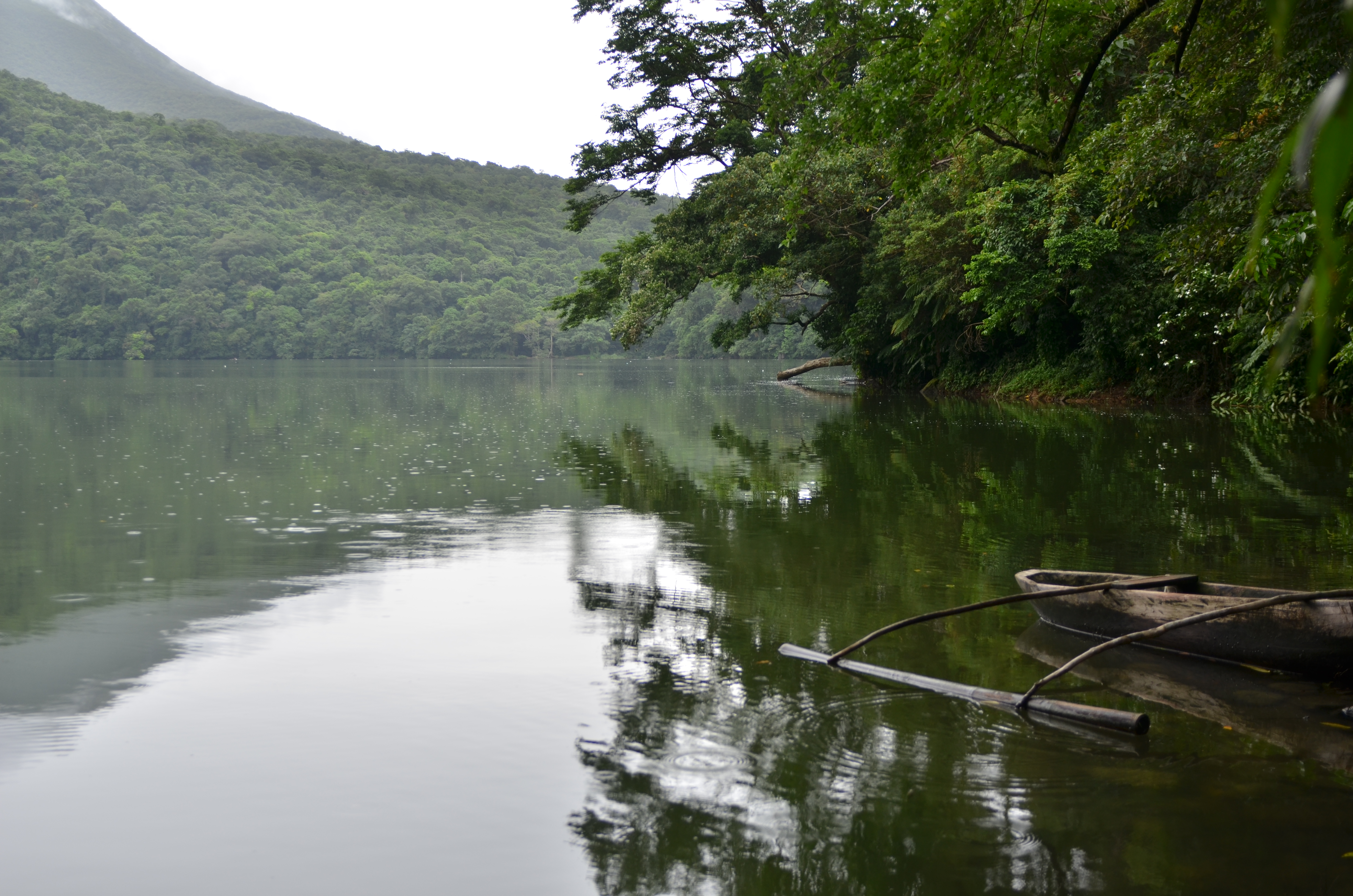 Bulusan Sorsogon